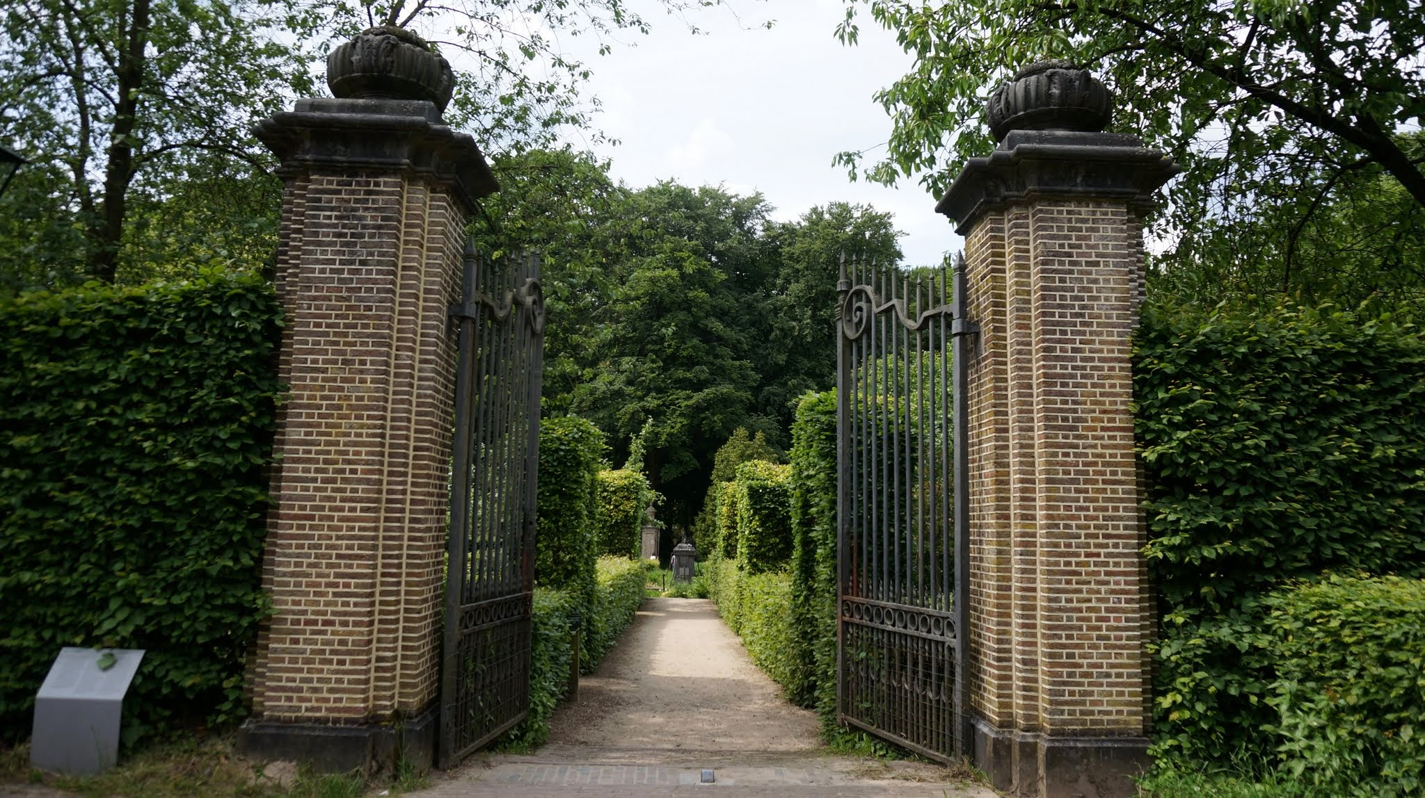 Noordoostelijk van Schaarsbergen, Arnhem, Netherlands